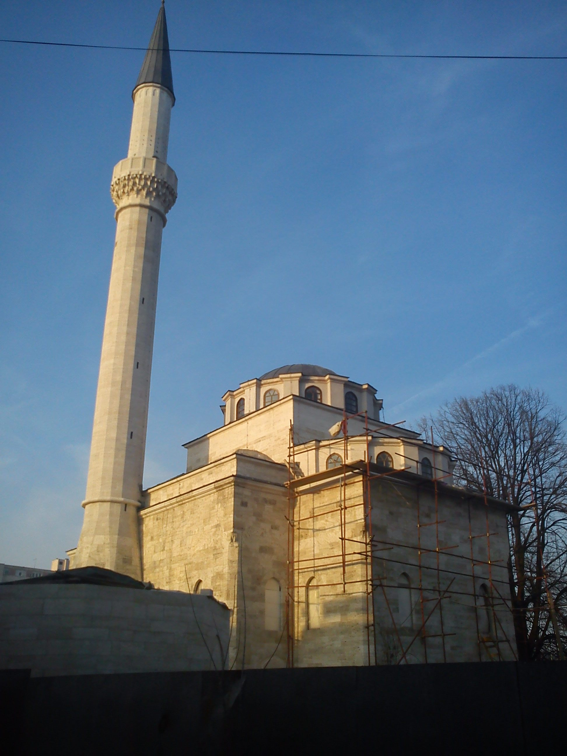 Ферхадија Бања Лука